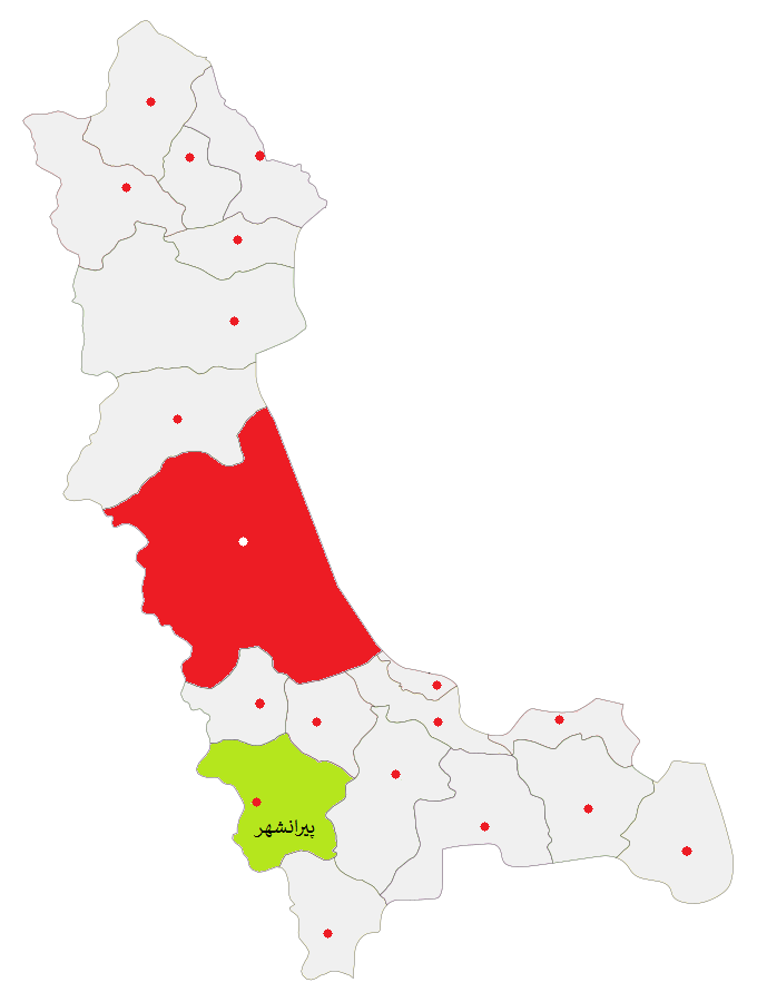 شهرستان پیرانشهر